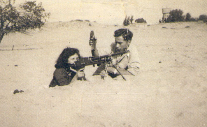 אימון כיתה בחי"ש